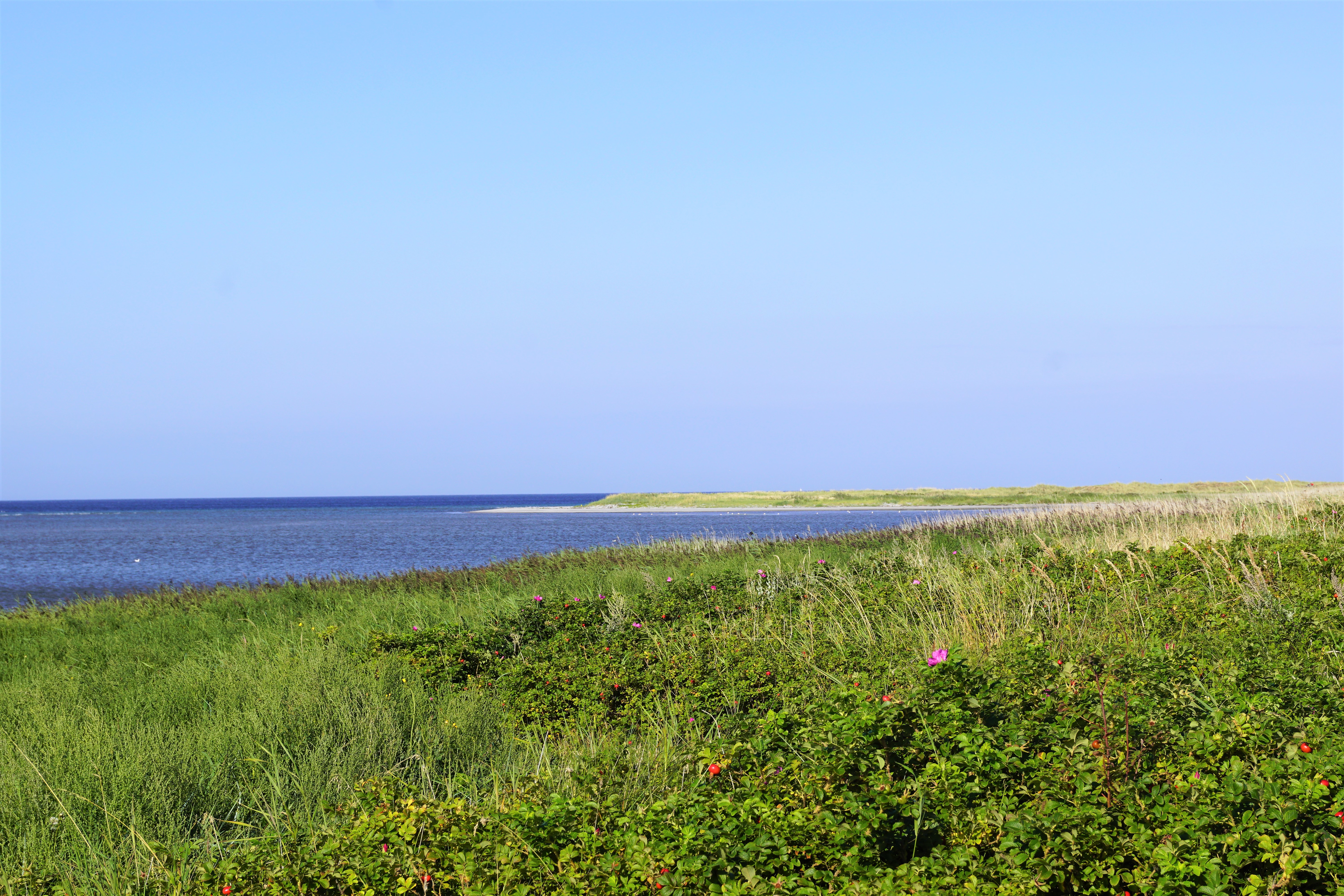 Rønnerev eller Havrevlen